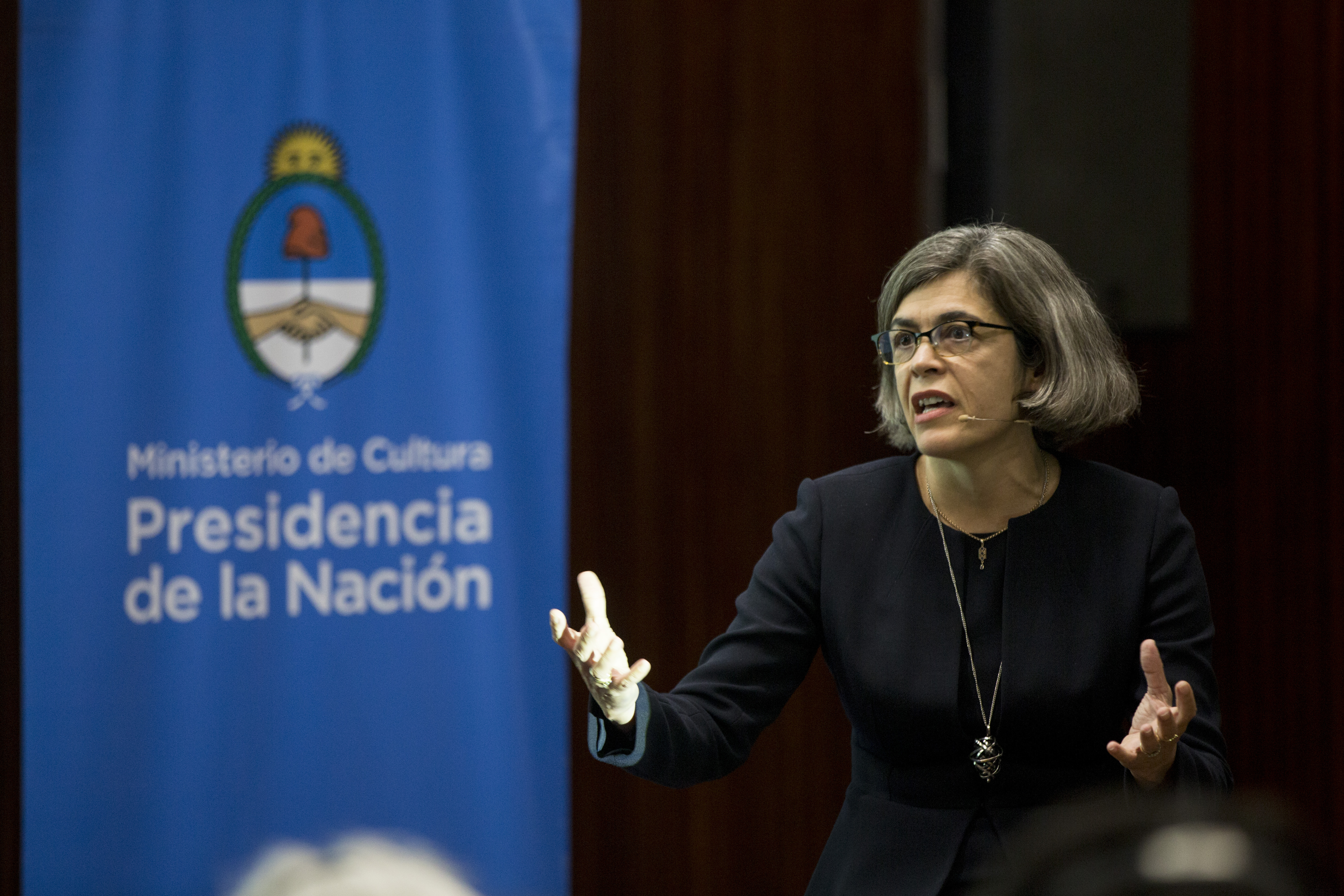 Buenos Aires, 23 de septiembre de 2017. En el Centro Cultural de la Ciencia se desarrolla la primera jornada de Ideas. El encuentro cuenta con la presencia de 13 oradores internacionales de primer nivel, junto a distintos pensadores argentinos que los entrevistarán y cruzarán ideas. Organizado por el Ministerio de Cultura de la Nación, a través de la Secretaría de Integración Federal y Cooperación Internacional, el encuentro tiene una duración de tres días y tiene como objetivo pensar juntos el futuro. Además, han llegado más de 80 jóvenes de todo el país invitados a participar no solo de las charlas, sino para que también desarrollen sus intelectualidades y sus propias ideas en diferentes talleres. Foto:Soledad Amarilla / Ministerio de Cultura de la Nación.